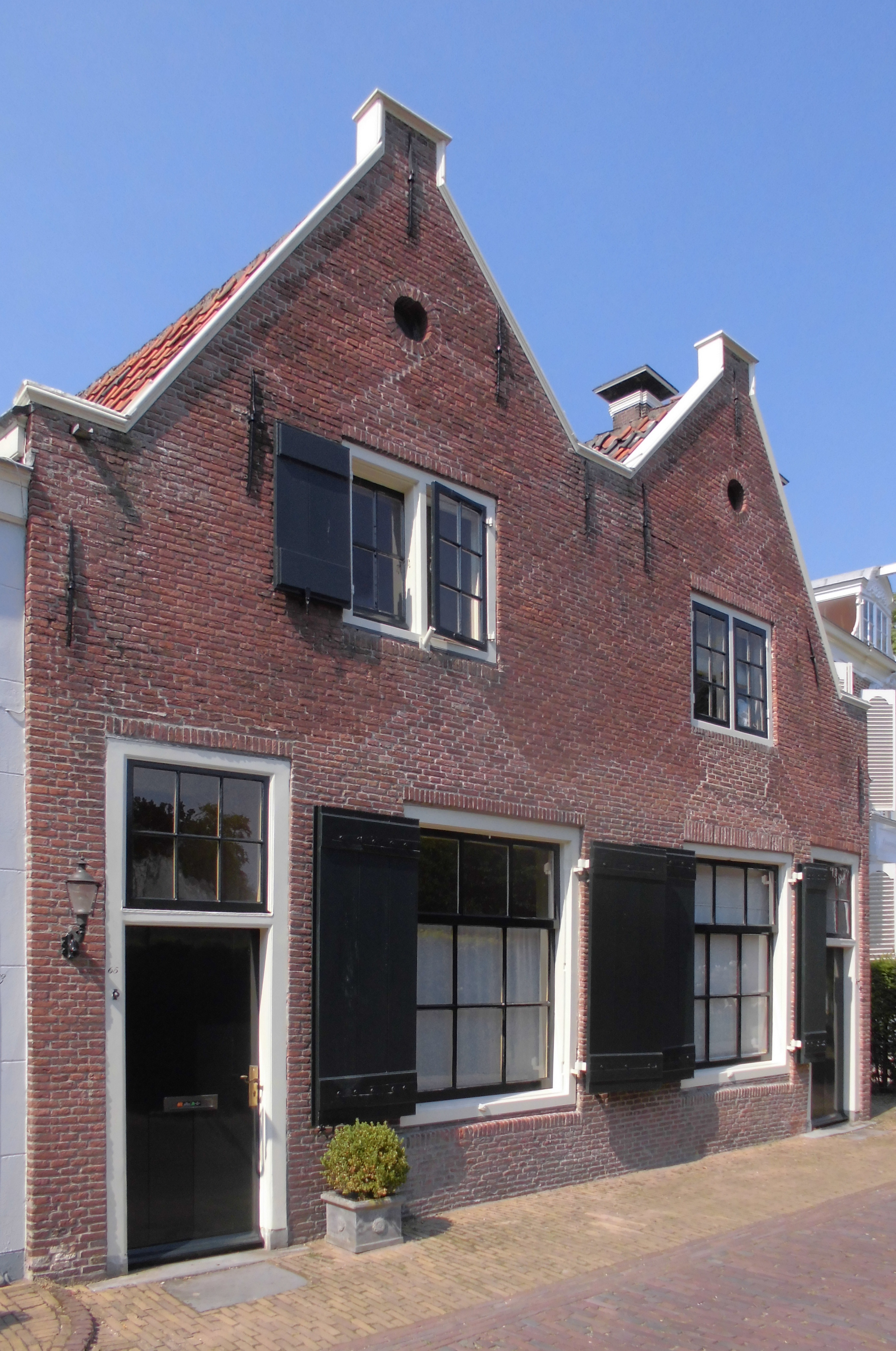 Dorpsstraat 65-67 Loenen aan de Vecht